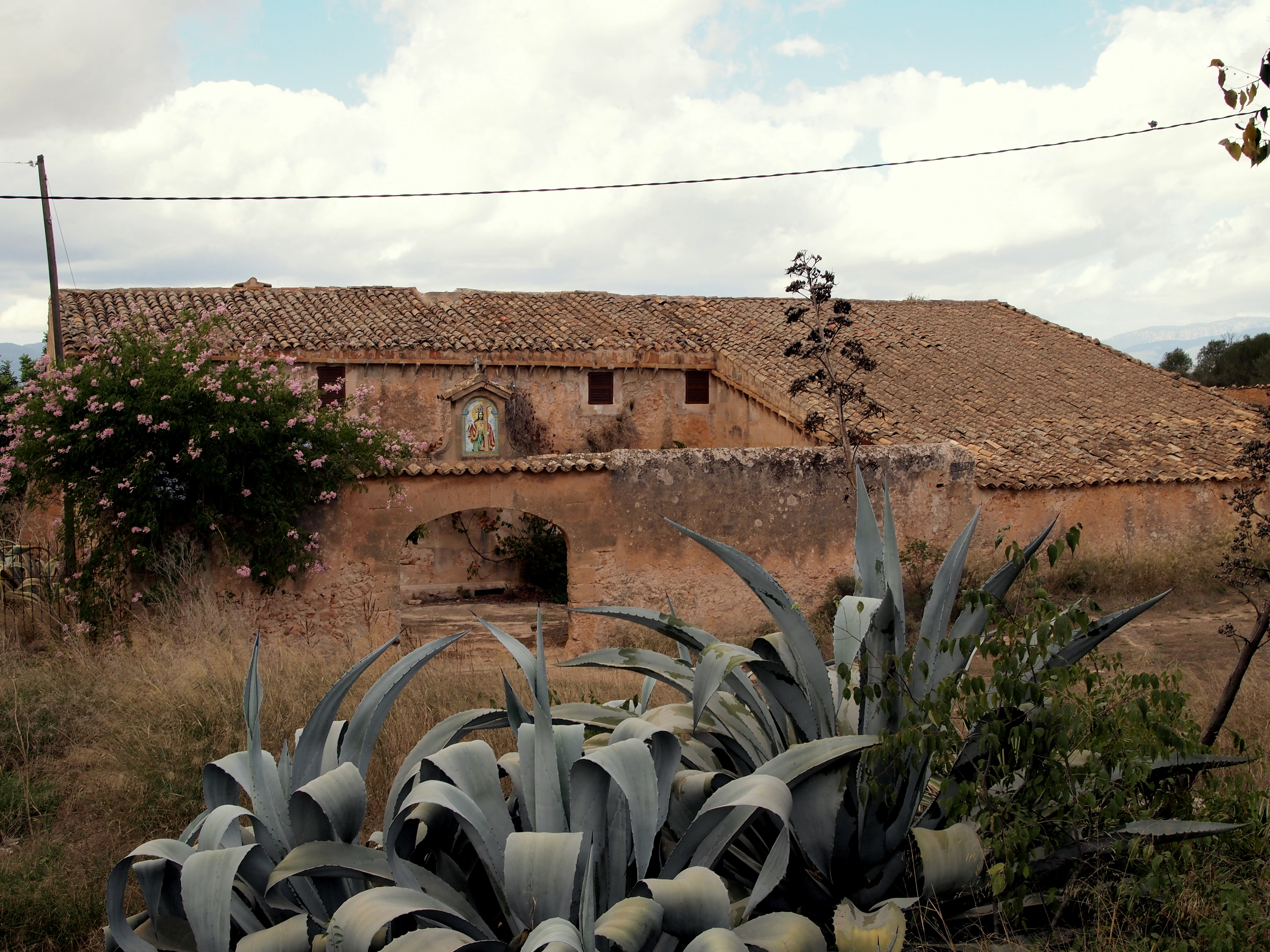 Cases de la possessió de S'Aranjassa (Palma)